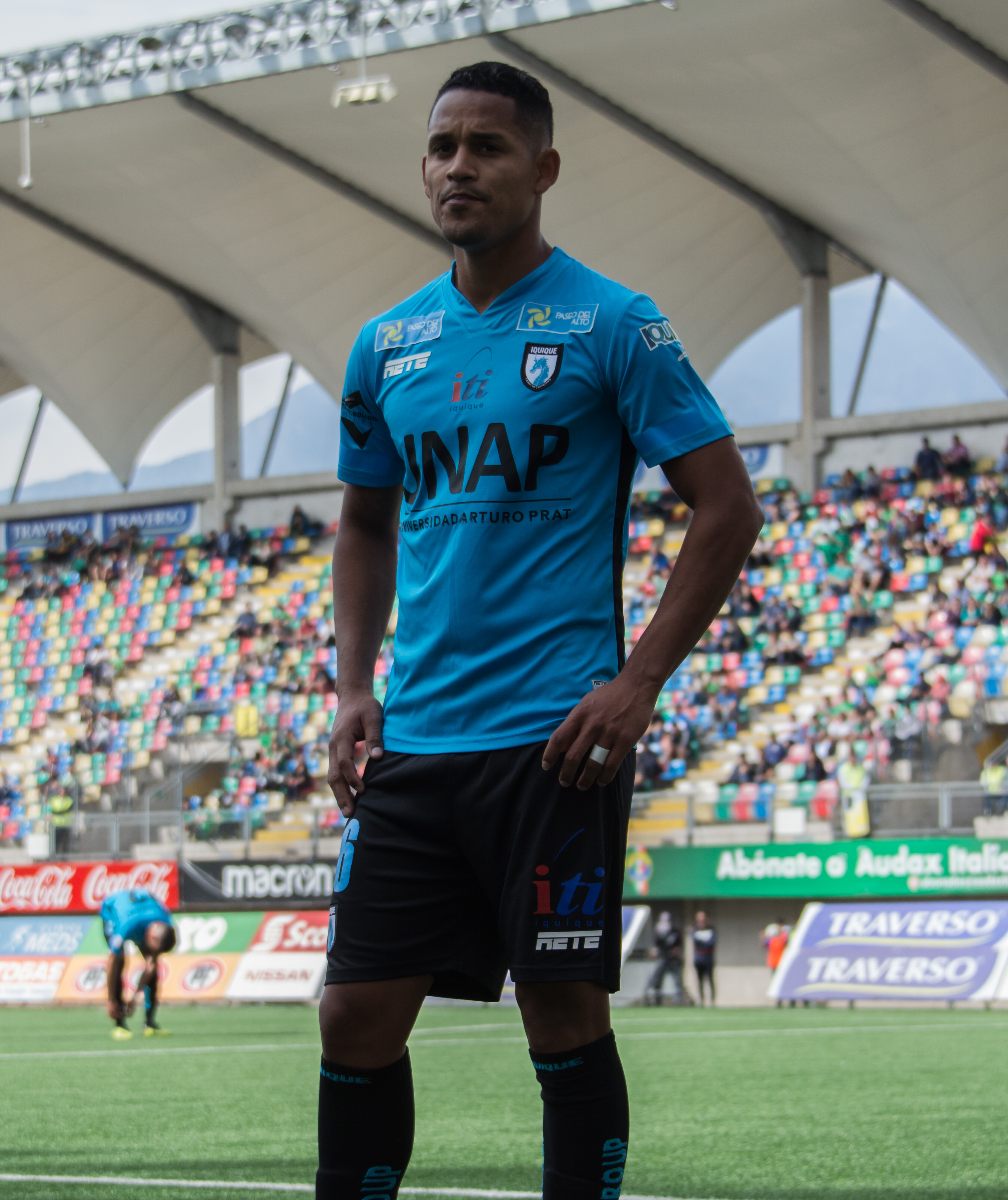 Edwuin Pernía, Audax Italiano v Deportes Iquique, Estadio Bicentenario de La Florida, La Florida, Santiago, Chile